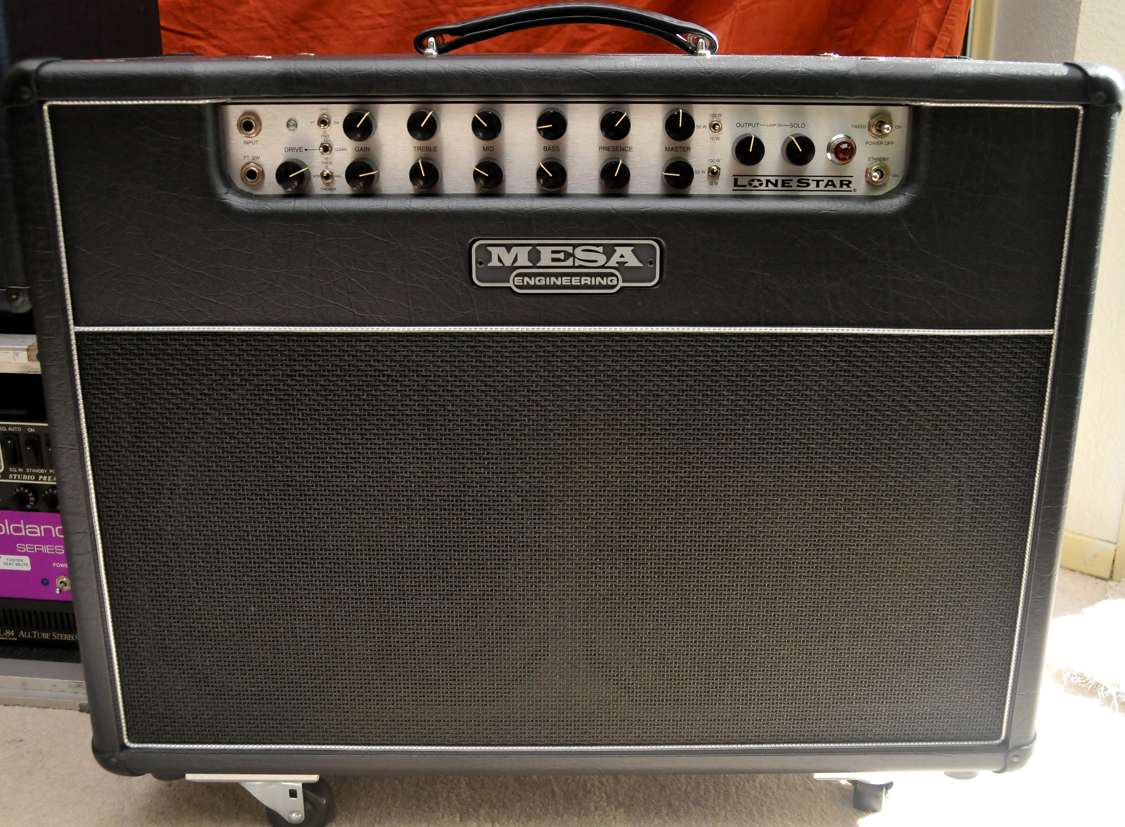 Mesa/Boogie Lone Star 2x12" Combo